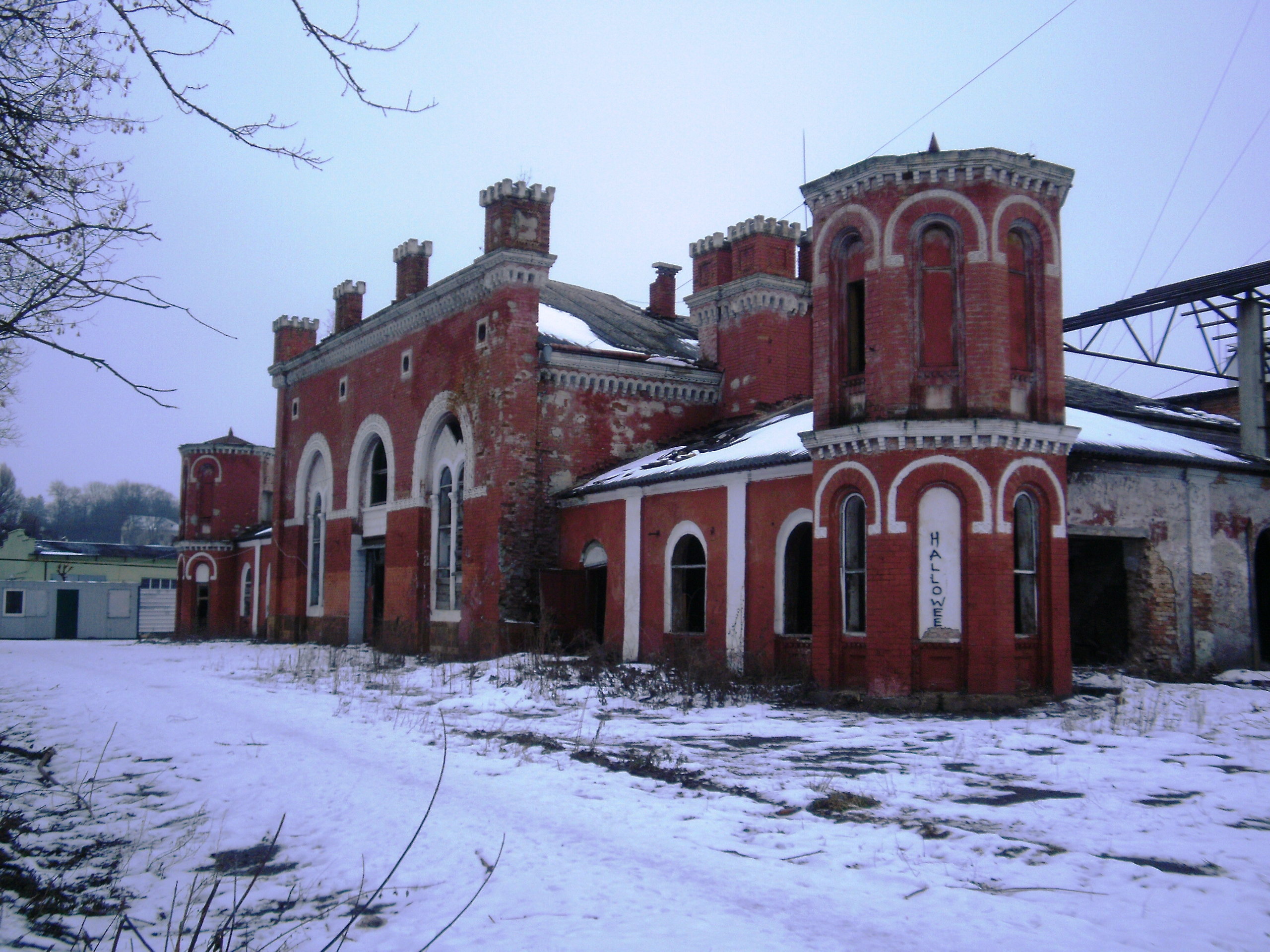 Синагога , Чернівці , Тореза Моріса, 198